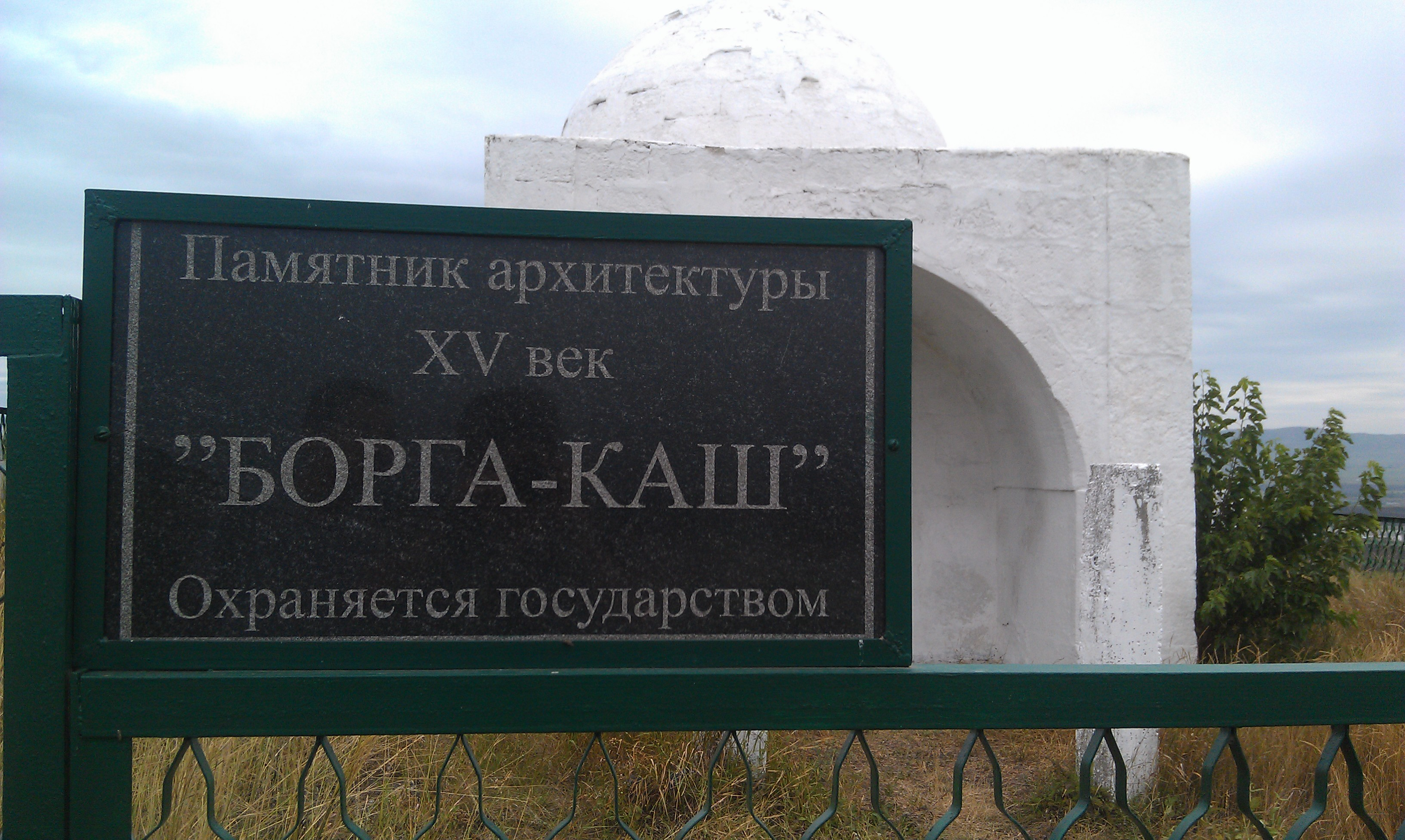 Мавзолей "Борга-Каш", табличка у входа на территорию мавзолея